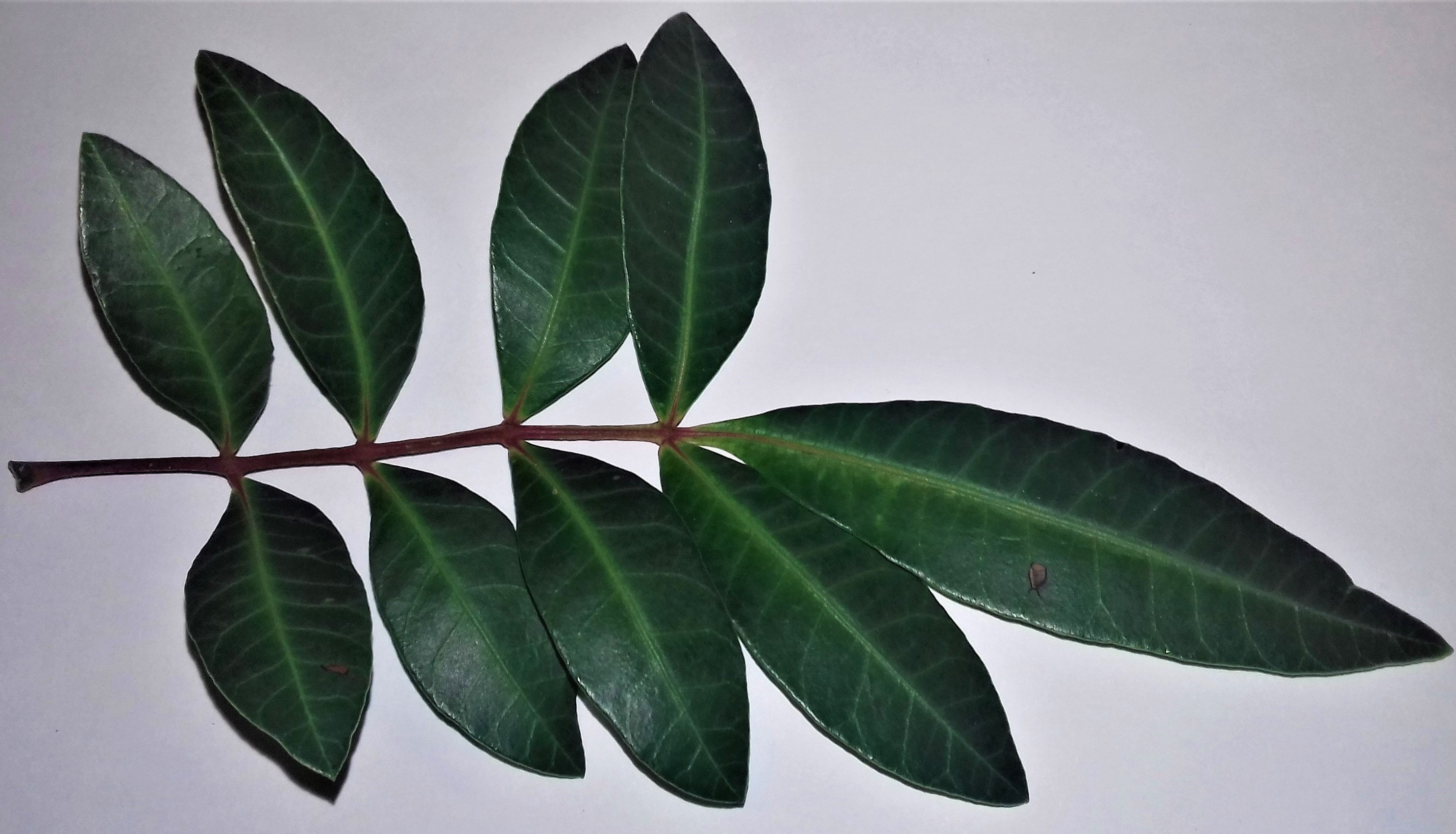 Feuille de Schinus terebinthifolius. Collectée dans le quartier du 6ème kilomètre à Nouméa, en Nouvelle-Calédonie. Le Schinus terebinthifolius fait partie des plantes envahissantes qui menacent la biodiversité de l'archipel.